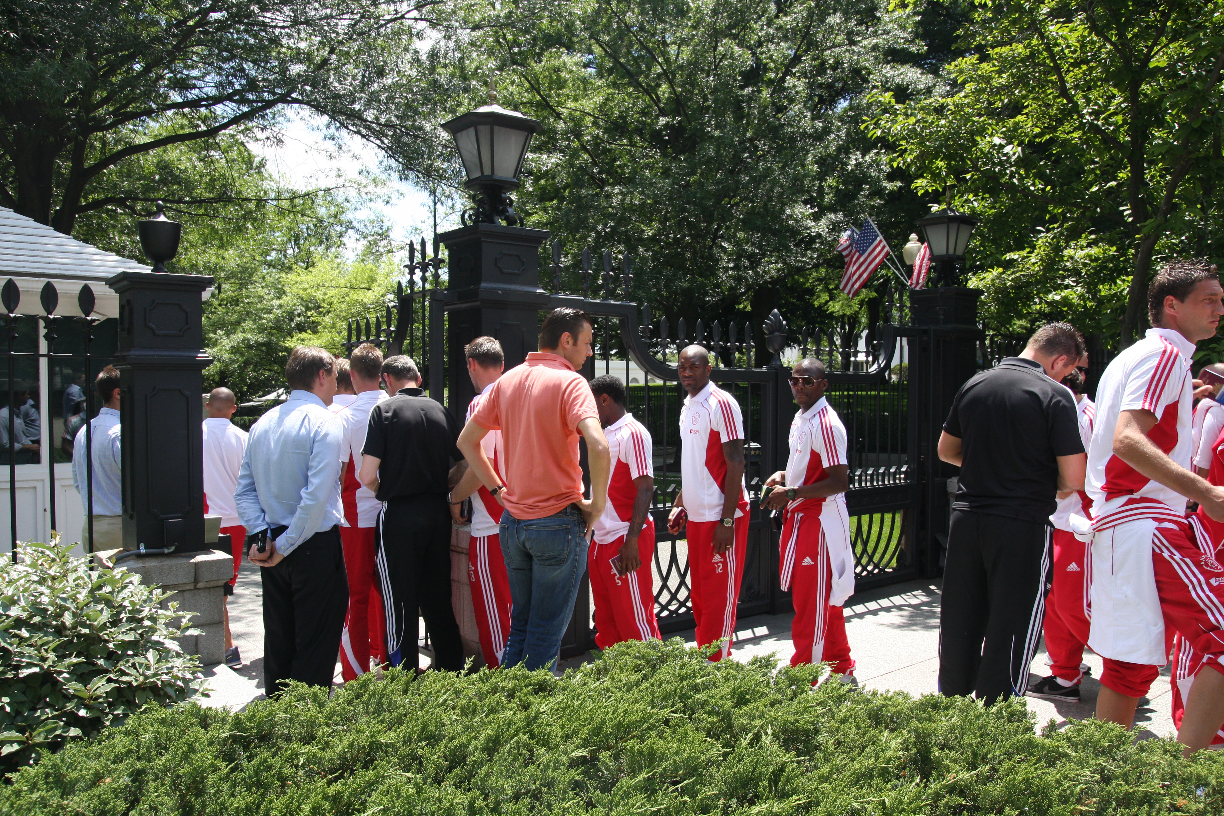 Kenneth Vermeer & Eyong Enoh